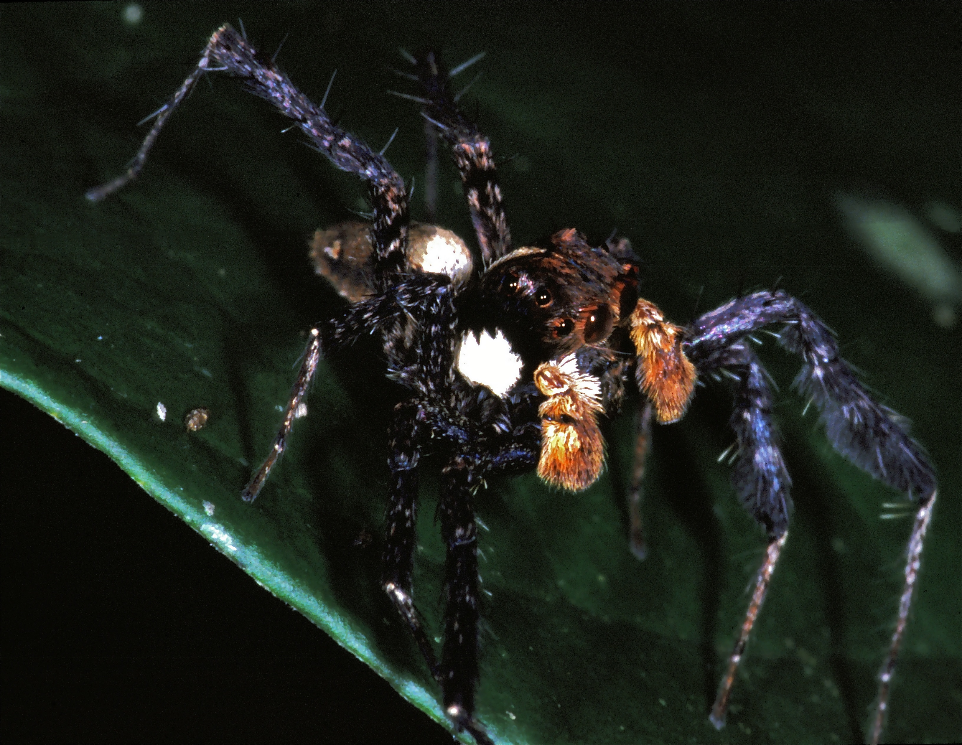 Khao Yai NP, THAILAND